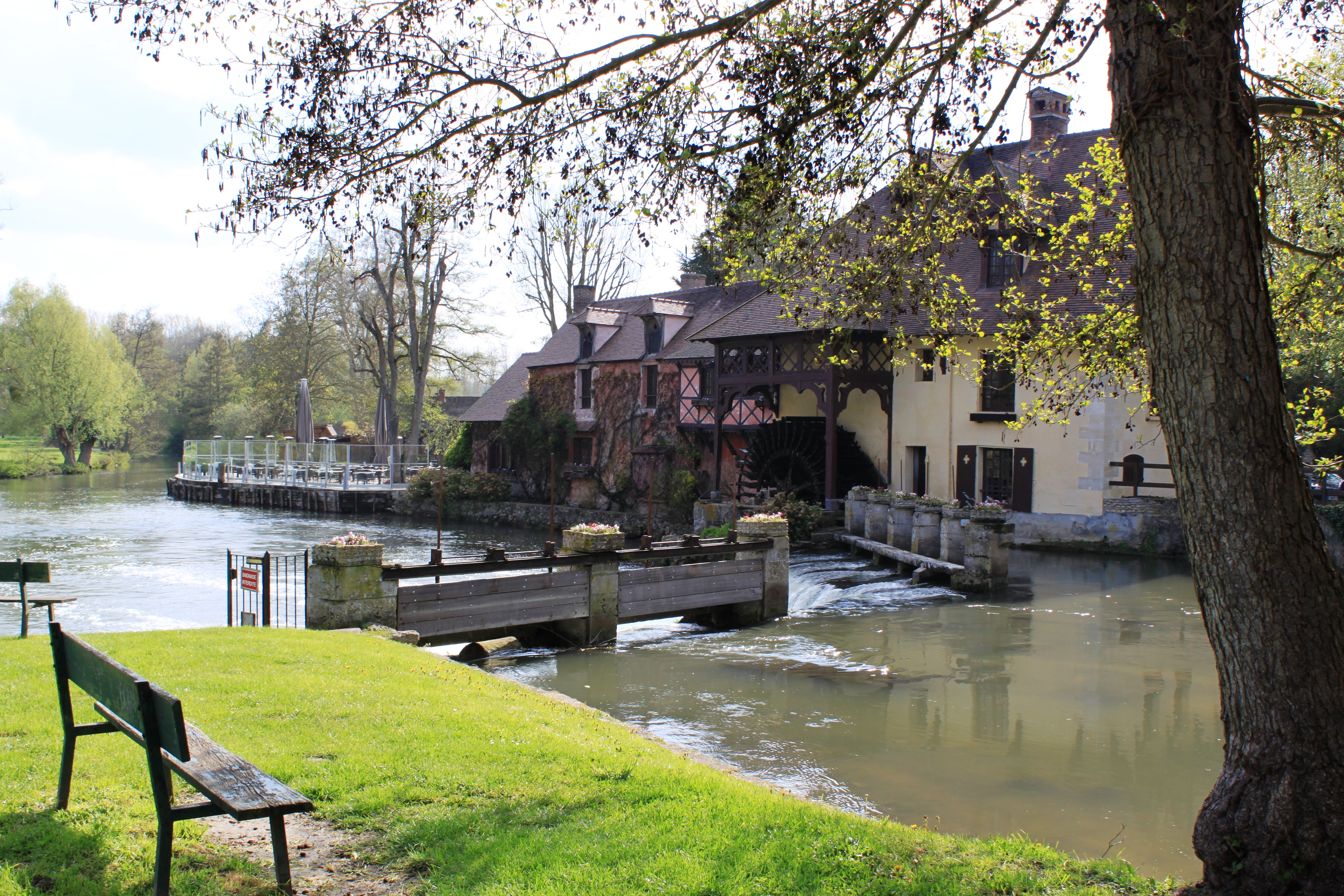 Le Moulin de Fourges, transformé en restaurant.